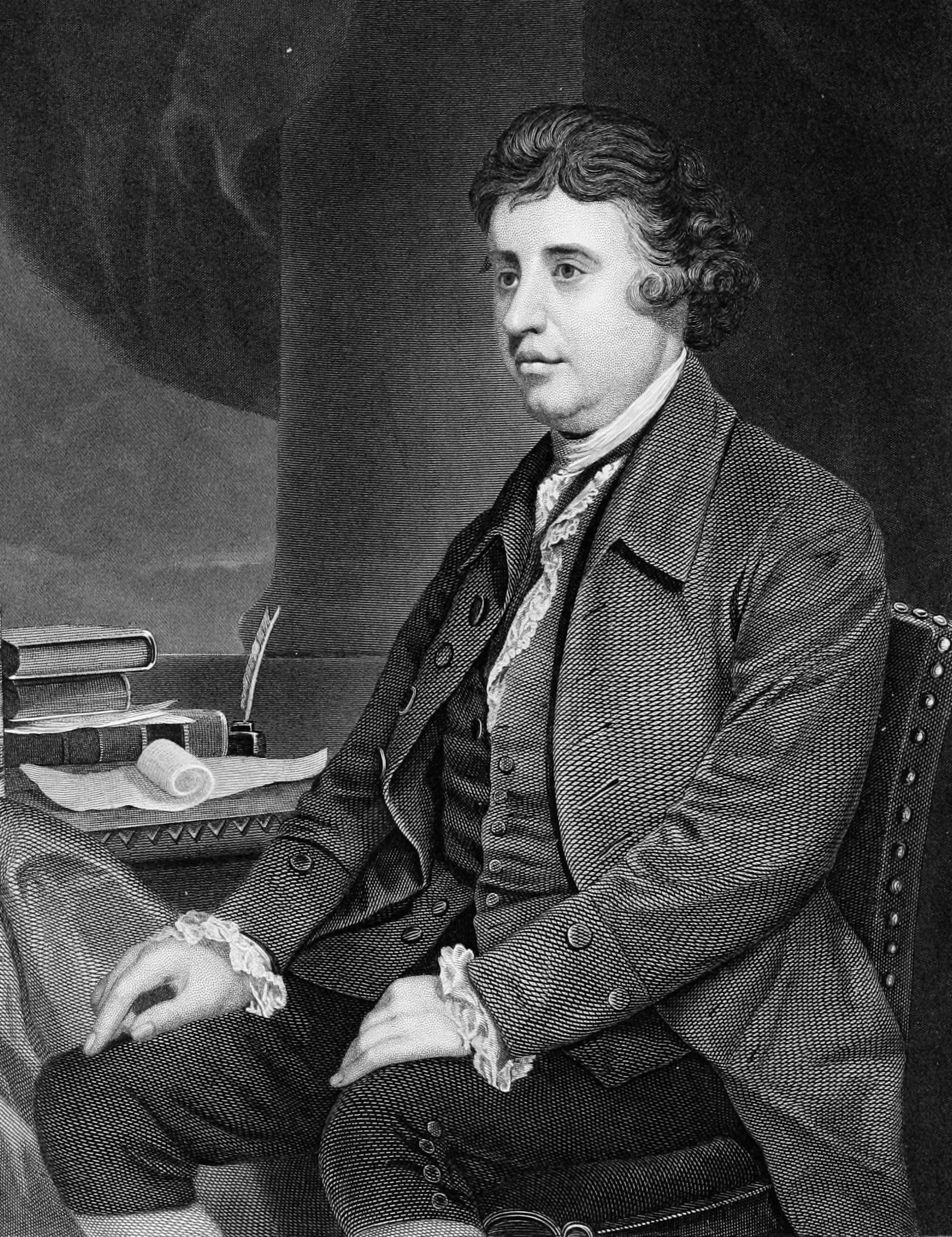 Edmund Burke